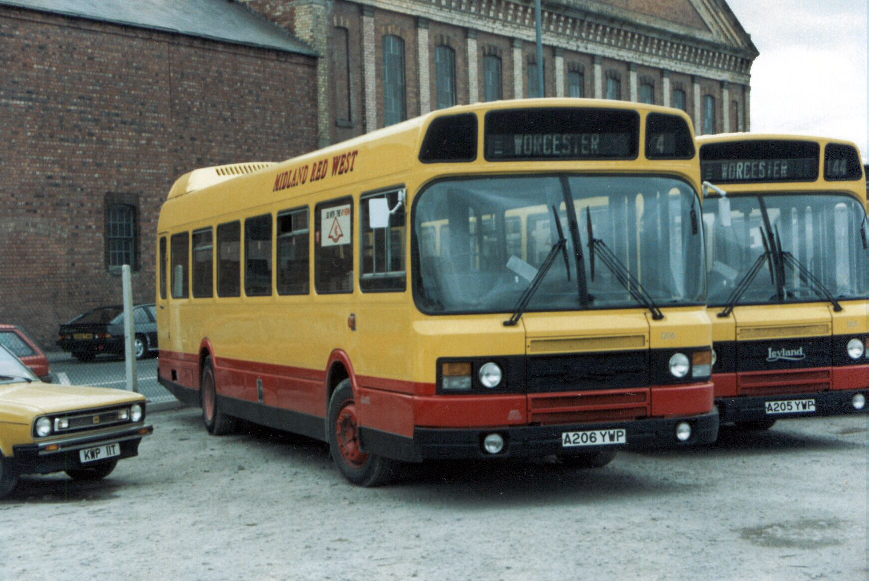 1206-h 1205 190388 cps